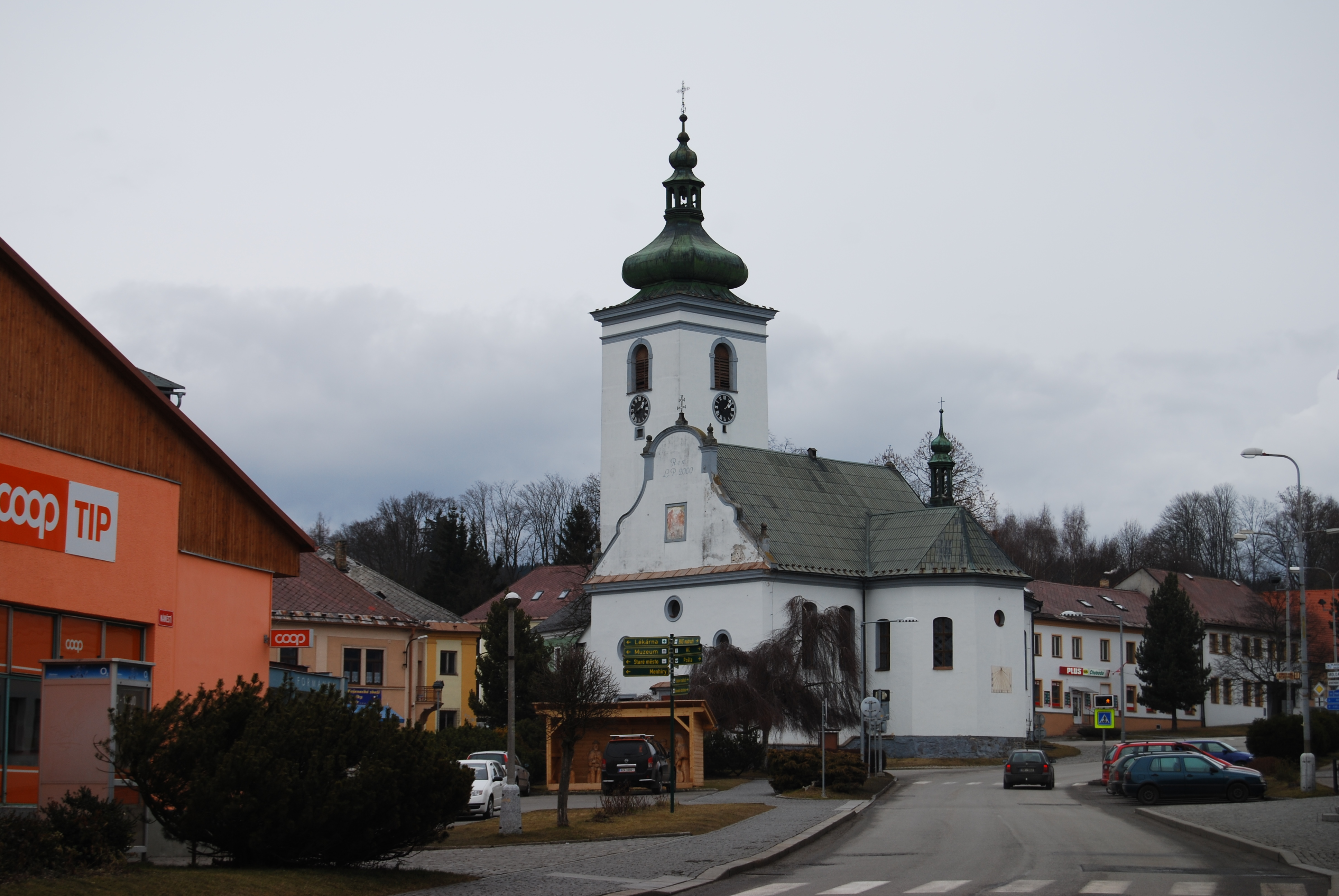 Kostel svaté Kateřiny a celkový pohled na náměstí. Volary v okrese Prachatice. Česká republika.